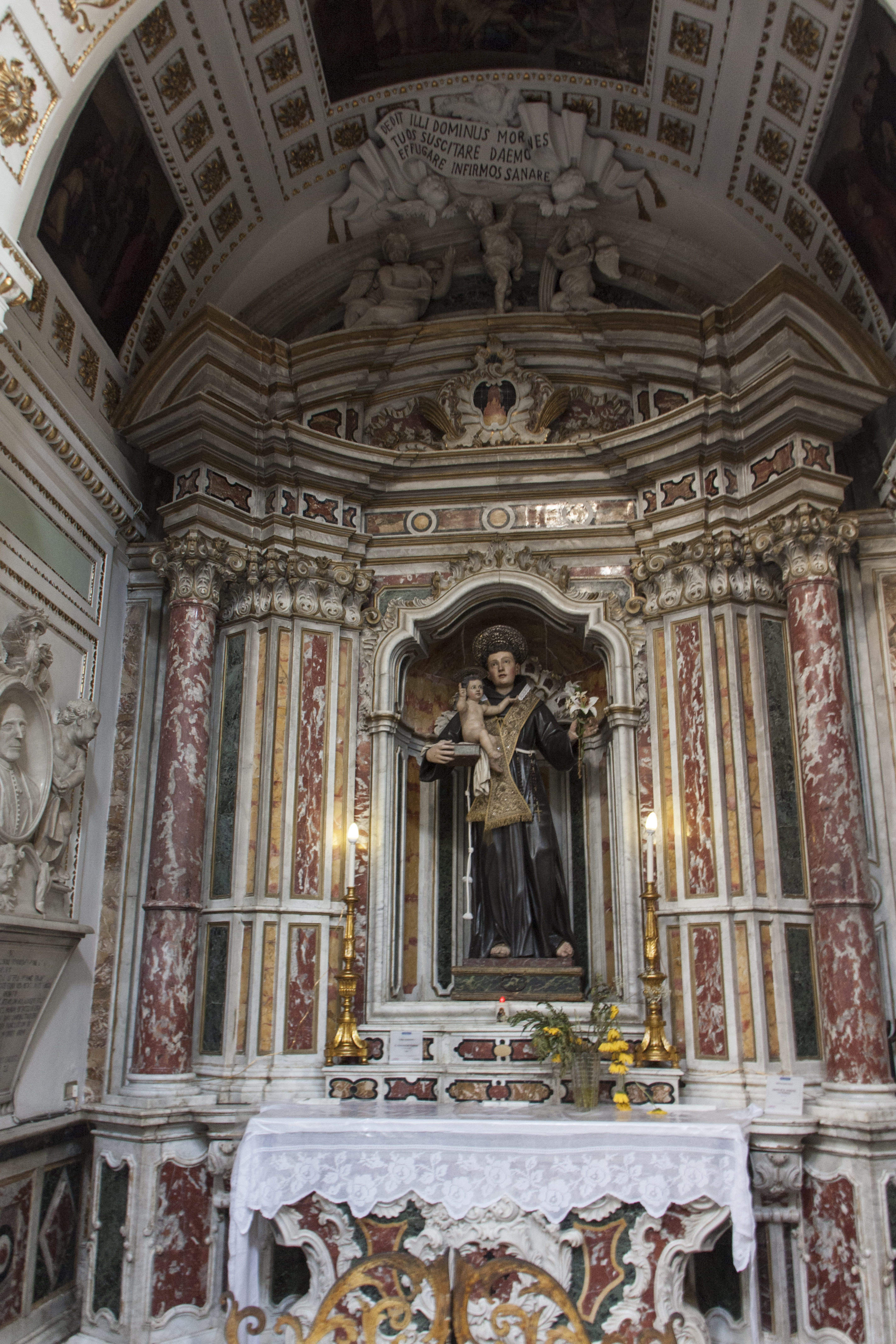 Matrice di Gangi